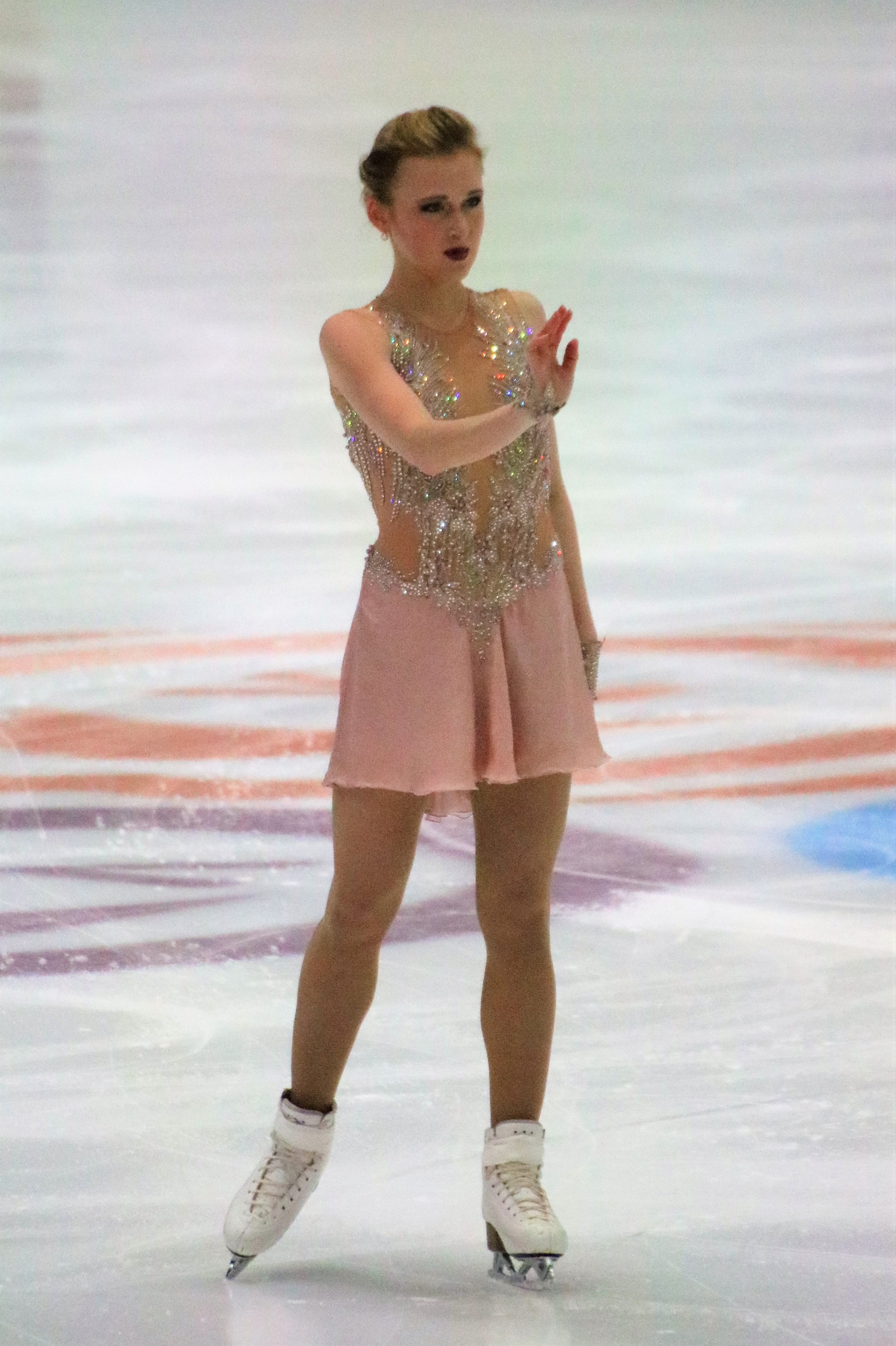 Антонина Дубинина (Сербия) на чемпионате Европы по фигурному катанию 2020